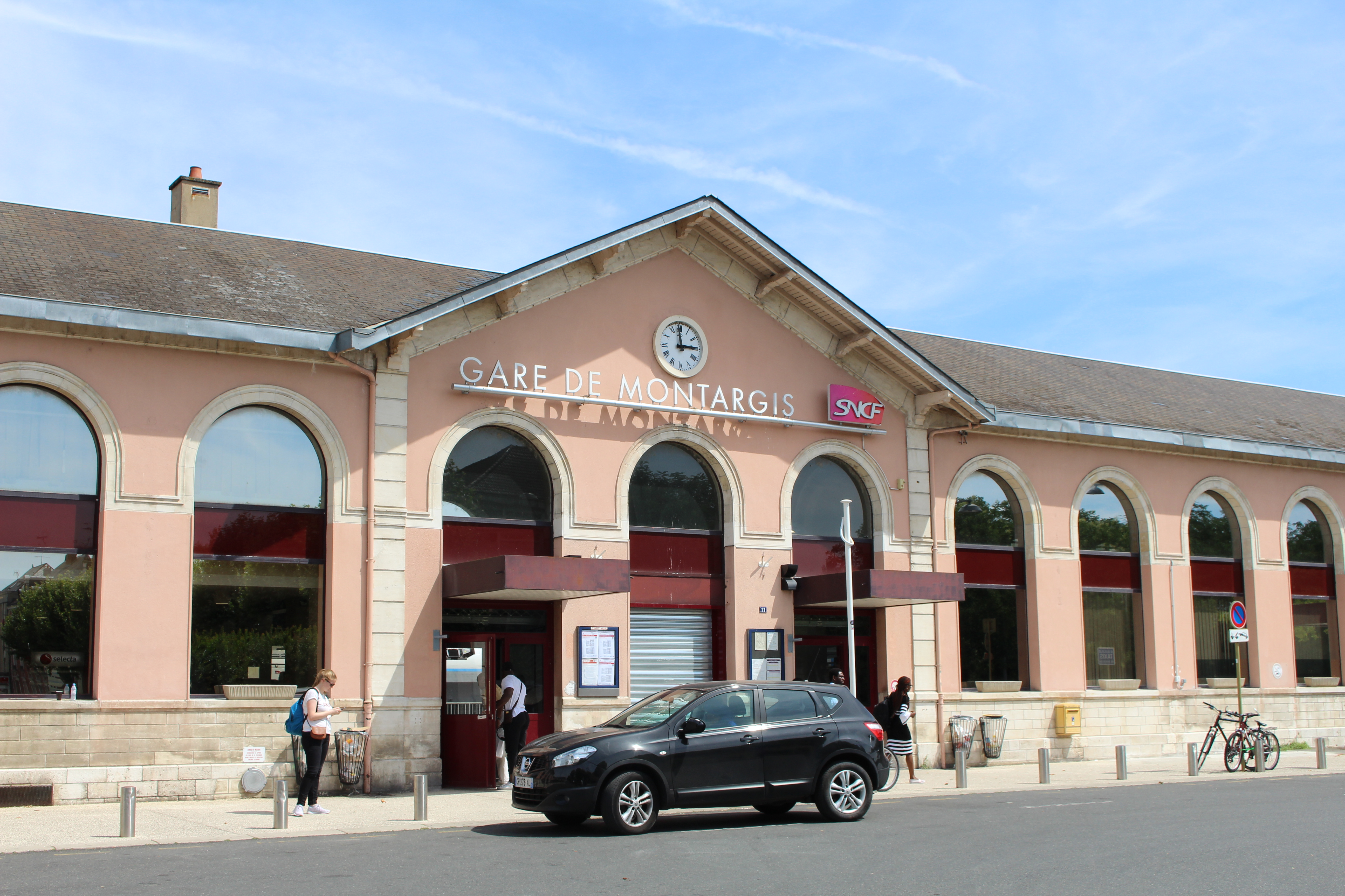 Gare de Montargis.